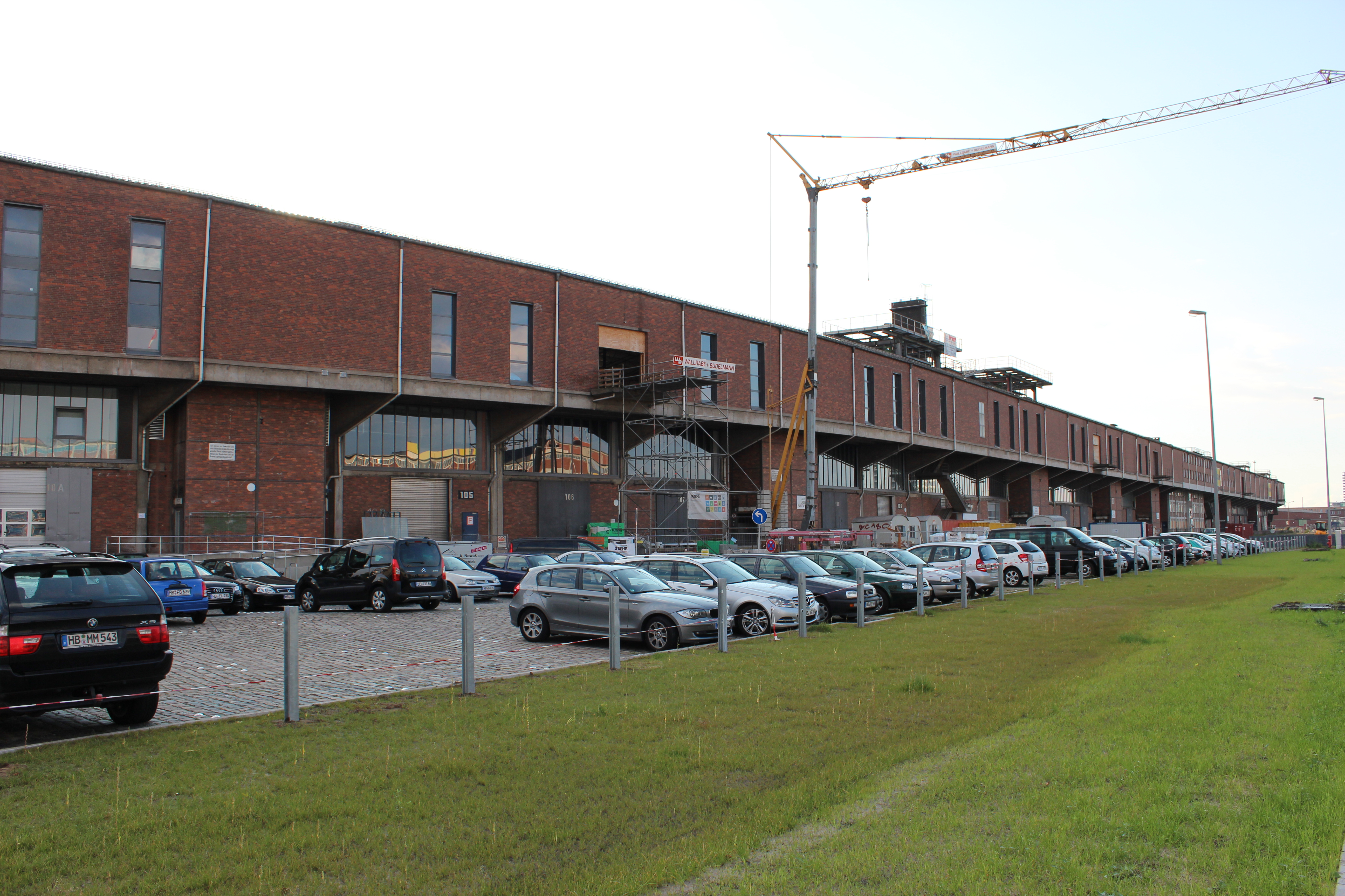 Schuppen 1 in Bremen, Konsul-Smidt-Straße 10.Das abgebildete Objekt ist ein geschütztes Kulturdenkmal in der Freien Hansestadt Bremen, mit der Nr. 1773 beim Landesamt für Denkmalpflege registriert.